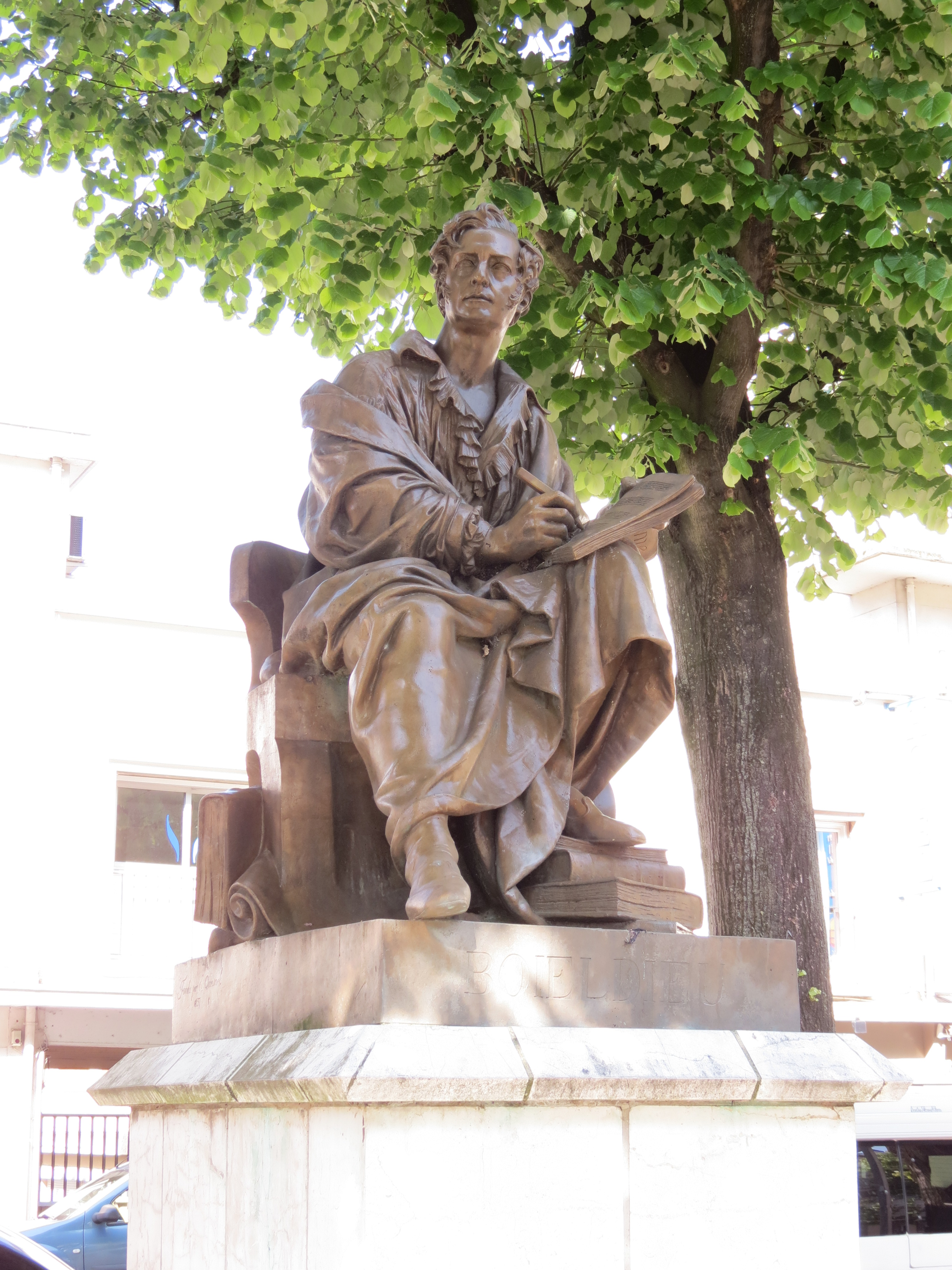 Statue Boieldieu à Rouen